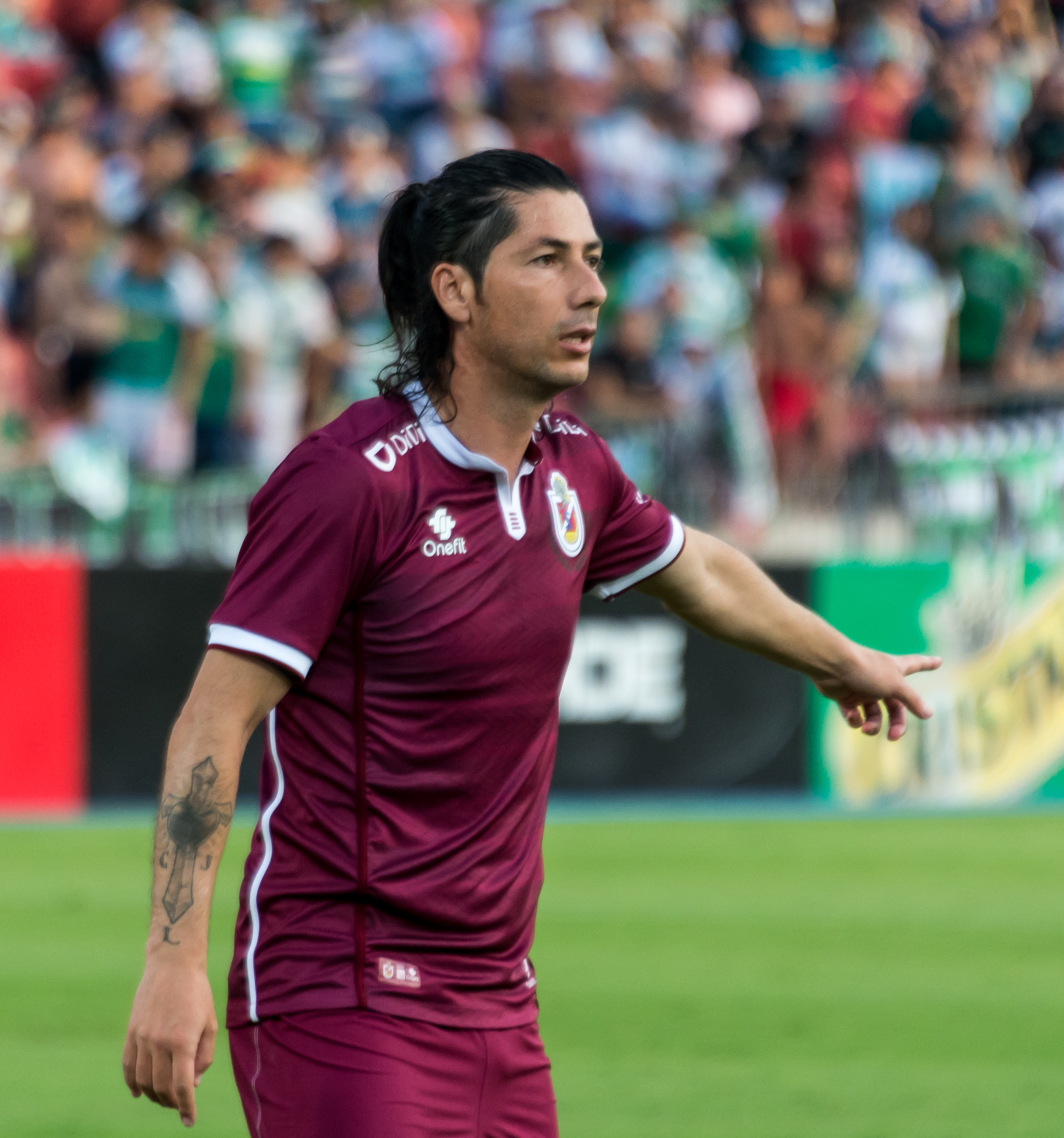 Deportes La Serena v Deportes Temuco, Estadio Nacional de Chile, Ñuñoa, Santiago, Región Metropolitana, Chile